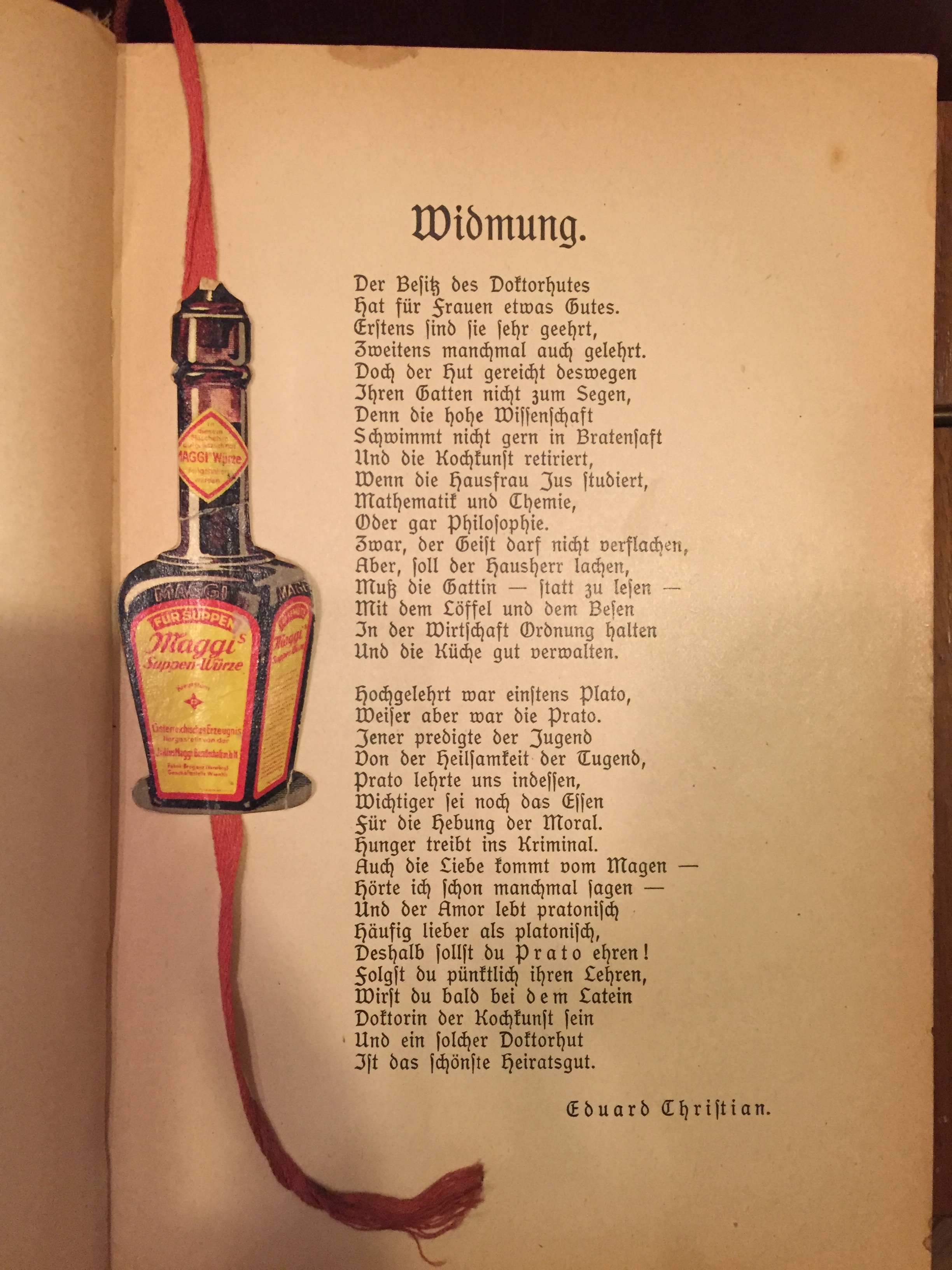 Widmungsgedicht von Eduard Christian, enthalten in der Styria Ausgabe von 1929